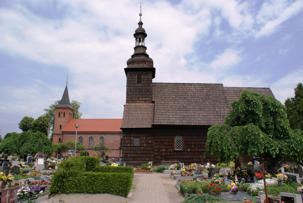 Walencinek